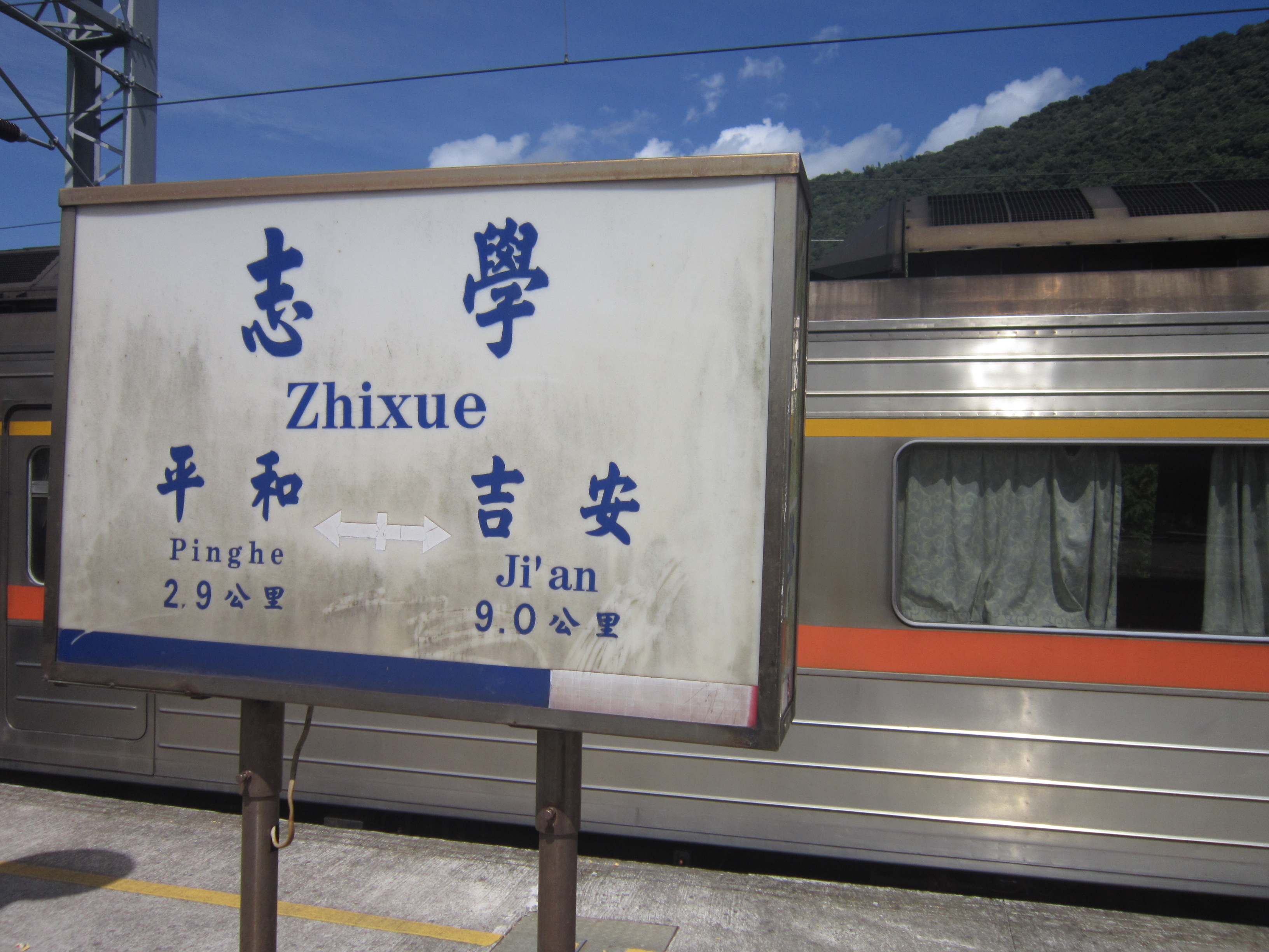 志學站站名告示及站距說明版，月台上停靠一列台鐵柴聯自強號(2016年8月)